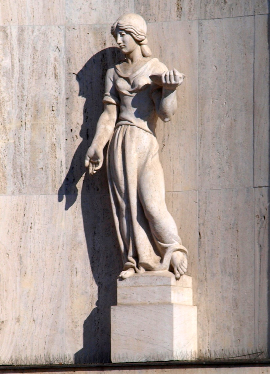 Emauzský klášter